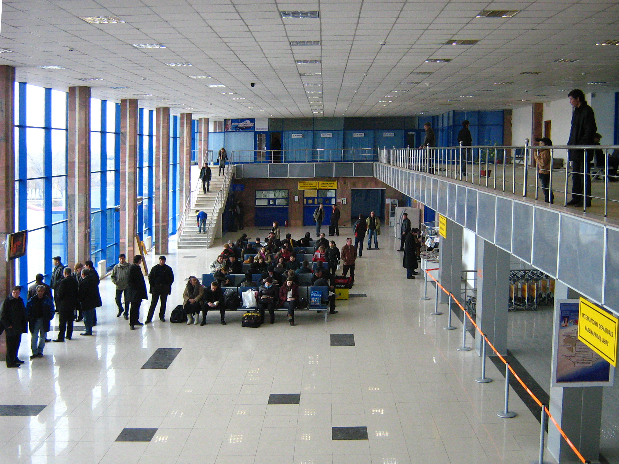 Atyrau Airport, Kazakhstan